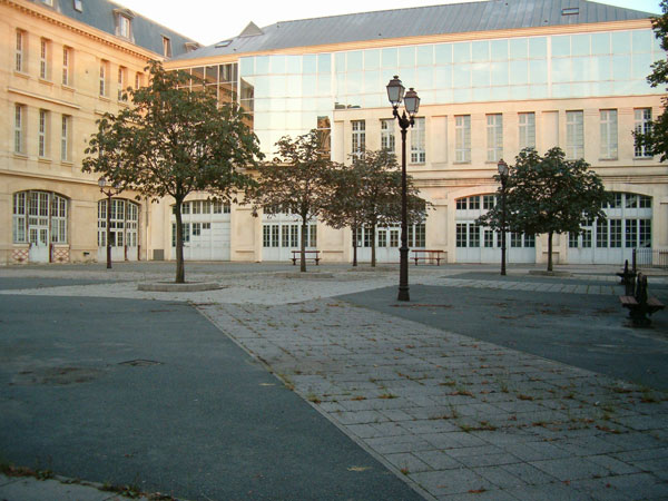 Vue de la cour du collège Michelet à Vanves (92, France)